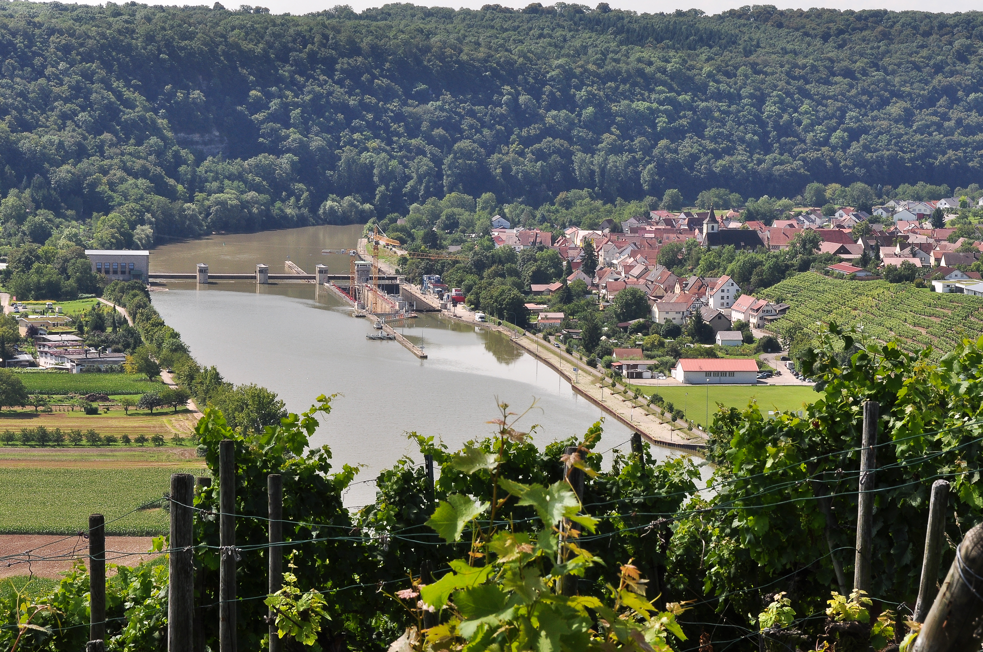 Ungefähr 500m hinter der Staustufe beginnt das Naturschutzgebiet Neckarhalde, welches sich ca. 2km am Ufer entlangzieht. Es ist ein 150-200m breiter Streifen, dem Fluß folgend. Das Waldgebiet dahinter gehört zum Landschaftsschutzgebiet 1.18.066 Neckartal zwischen Hessigheim und Besigheim: Hamberg, Neckarhalde, Hörnle, Häslach und Wasen